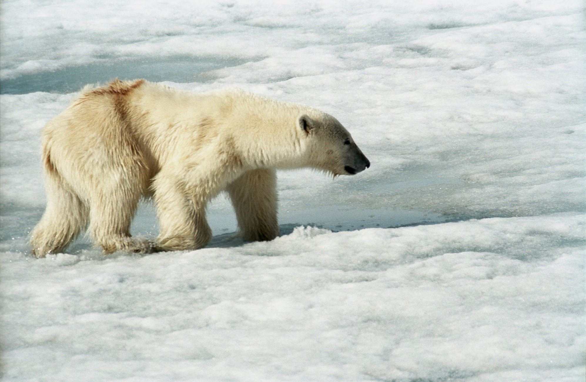 Polar Bear, Spitsbergen, Hornsund